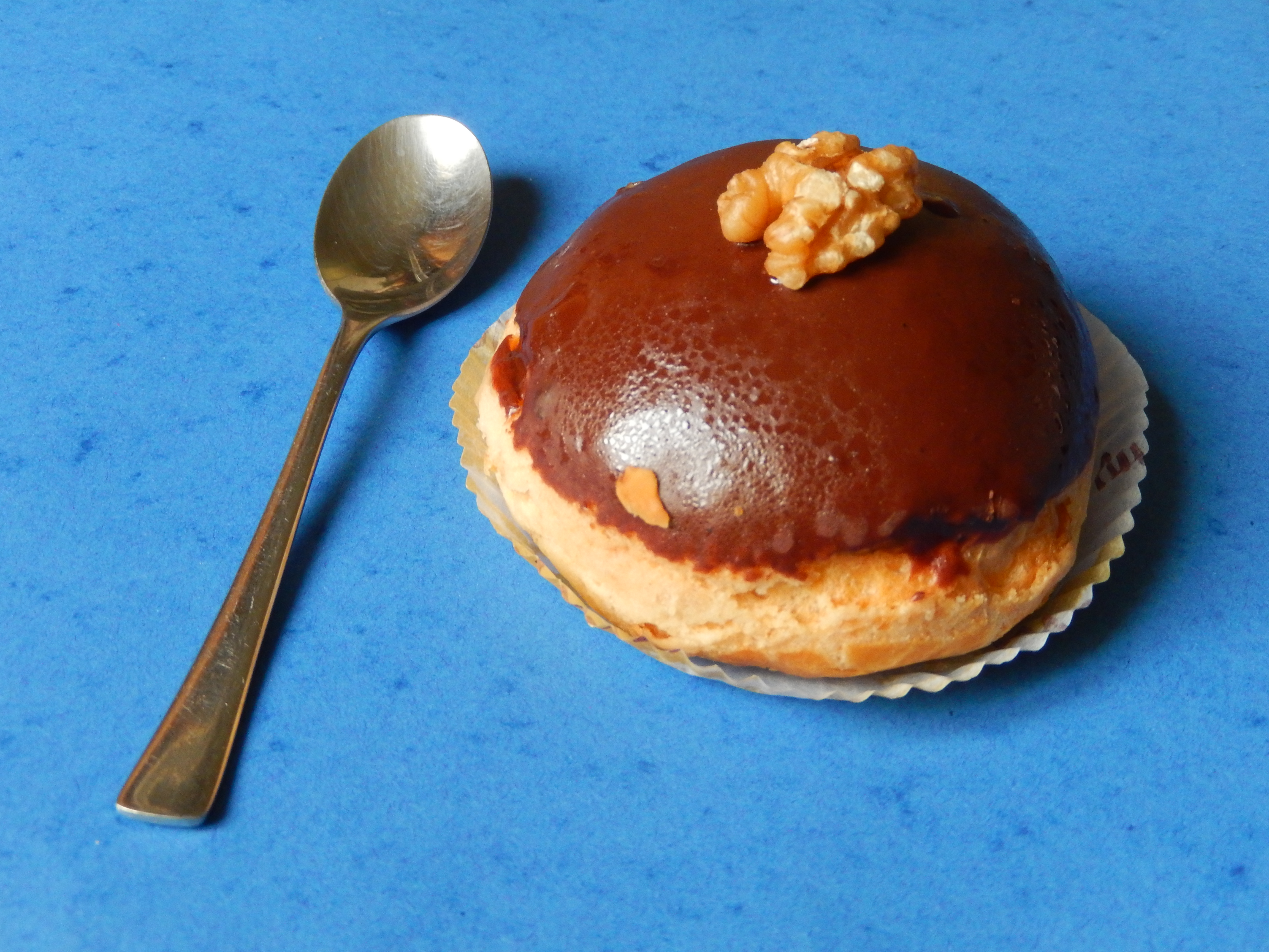 Une « noix charentaise » achetée dans une boulangerie de Cognac.